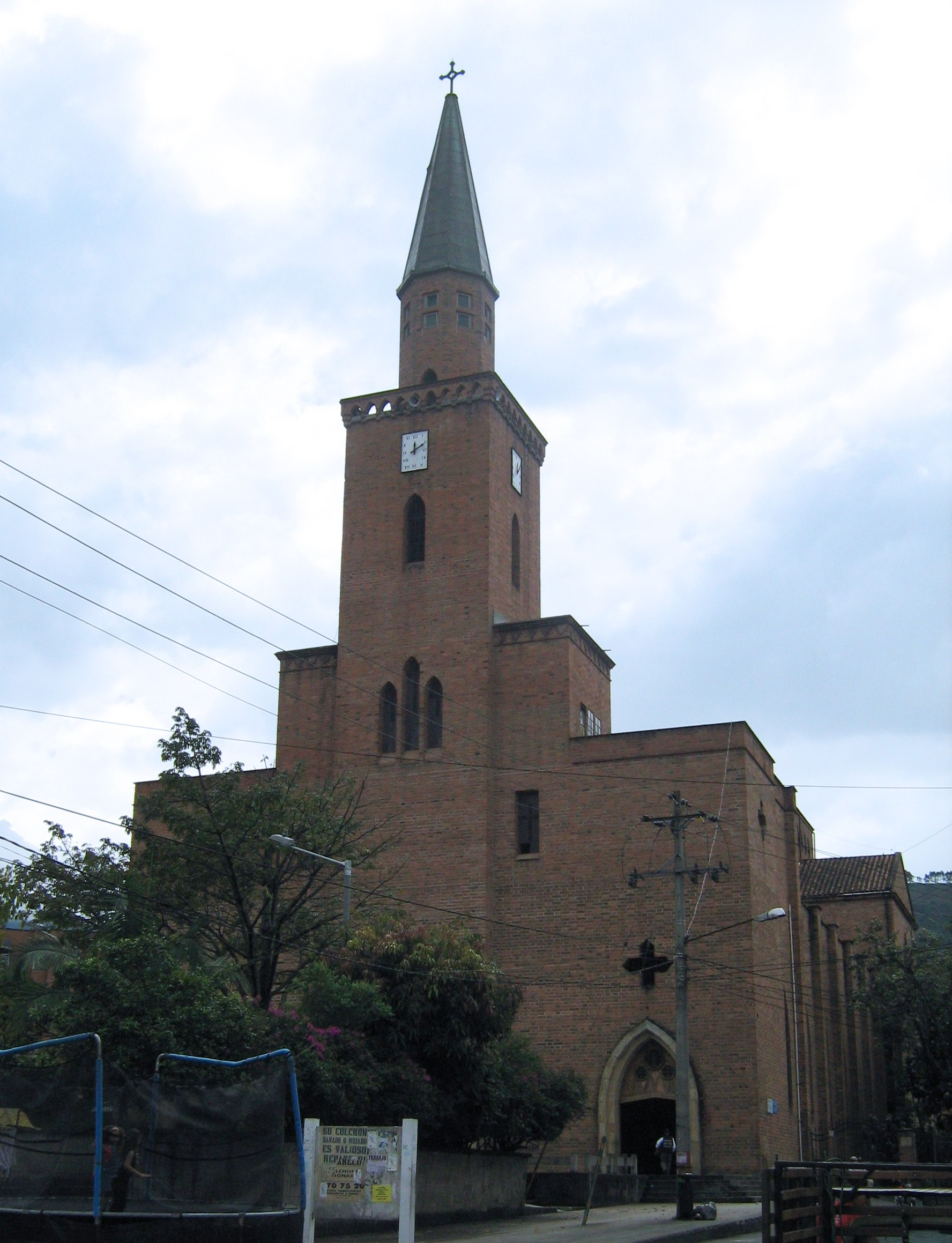 Fachada de la iglesia San José en Envigado. Antioquia. Colombia